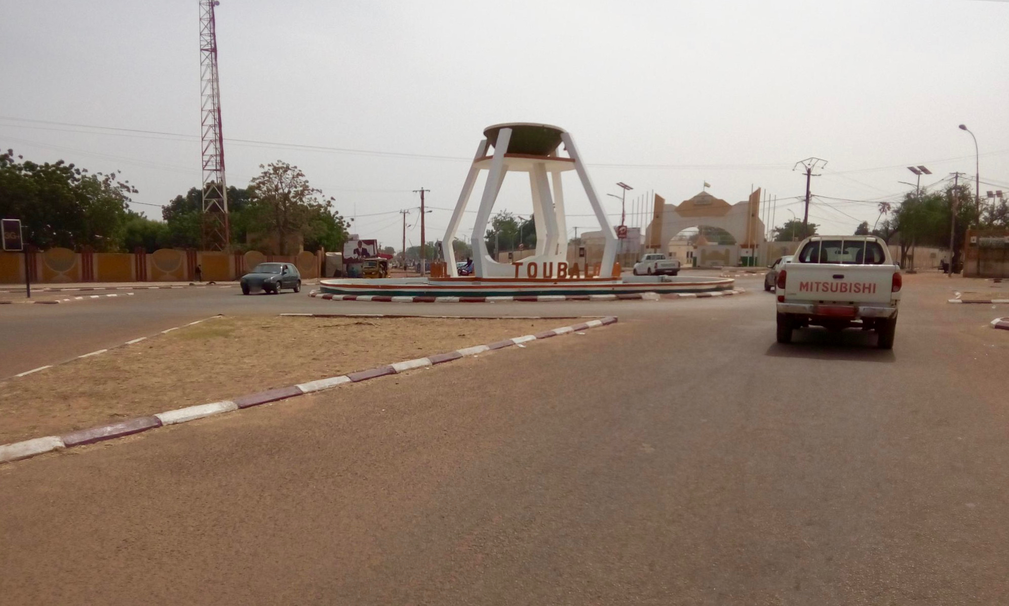 Nationalstraße 1 beim Gouvernorat de Dosso in der Stadt Dosso, Niger.